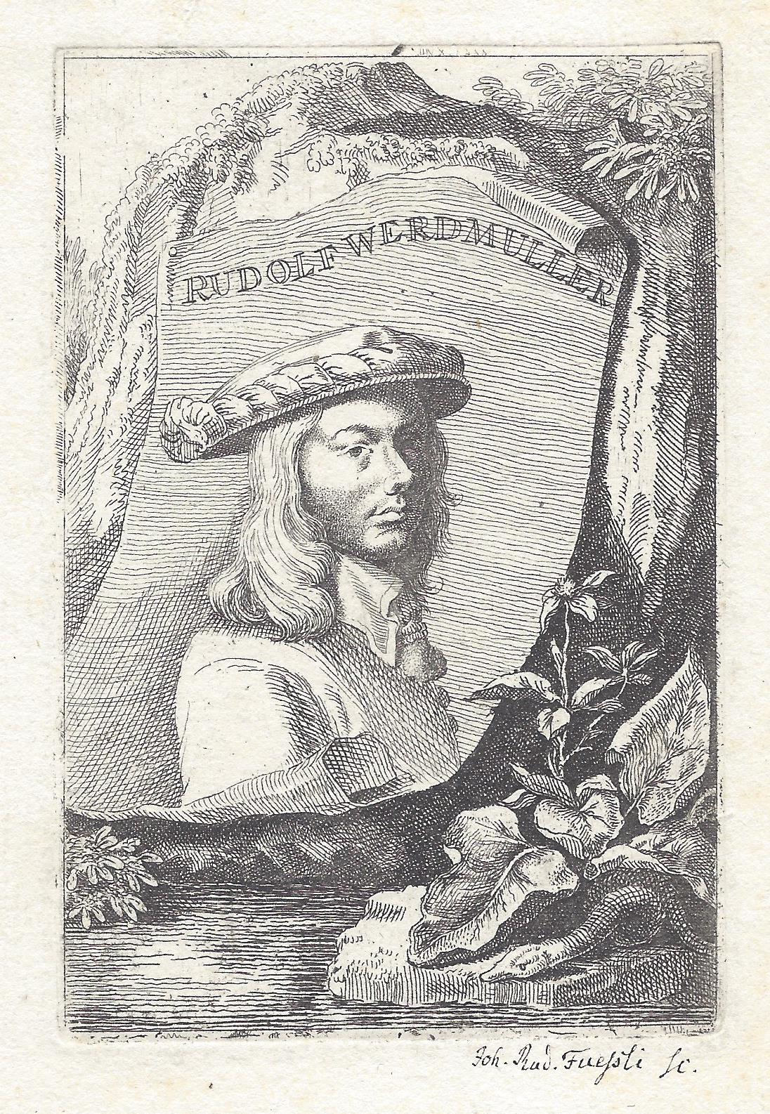 Johann Rudolf Füssli Portrait des Johann Rudolf Werdmüller